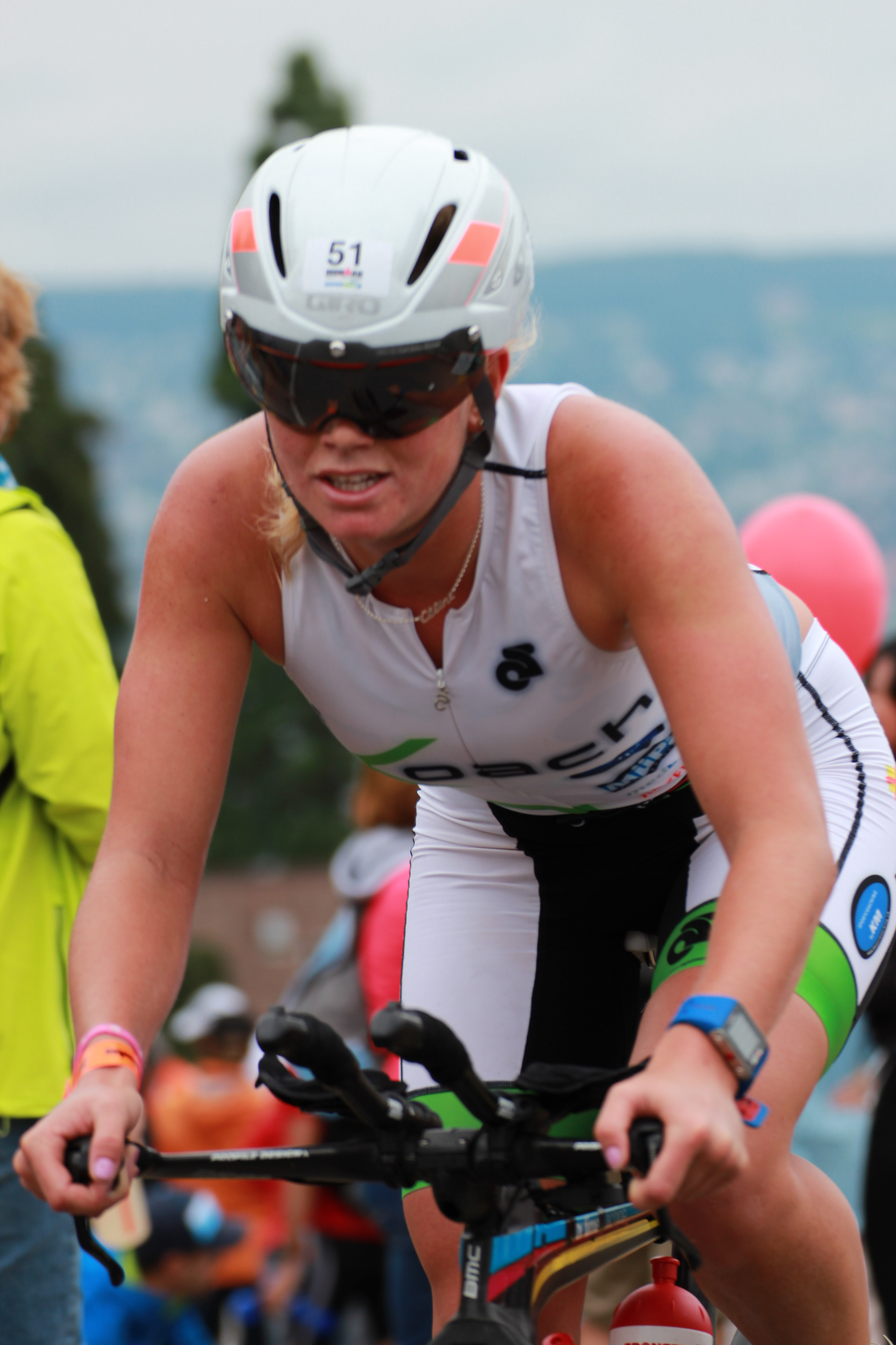 Céline Schärer at Ironman Switzerland 2014.jpg